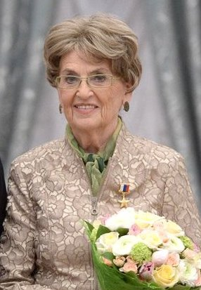 Москва, Кремль. 1 мая 2014 года. Звание Героя Труда присвоено президенту Государственного Владимиро-Суздальского историко-архитектурного и художественного музея-заповедника Алисе Аксёновой.